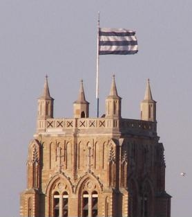 Les couleurs de la ville de Dunkerque hissées sur le Beffroi